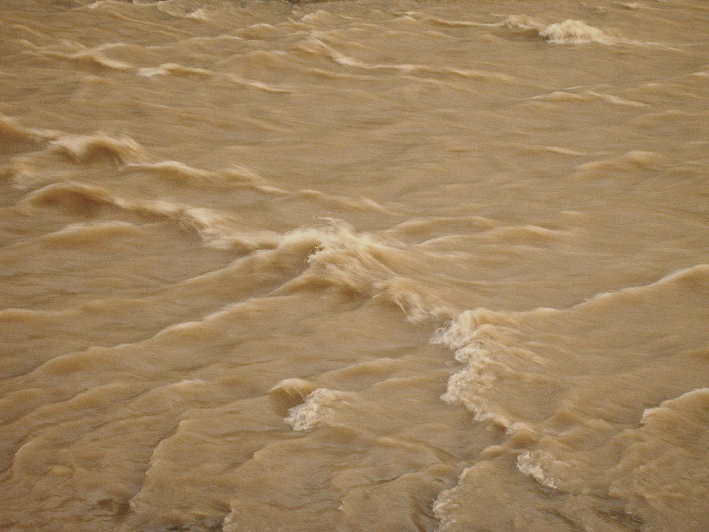 Las contaminadas aguas del río Mapocho, en Santiago de Chile. Fotografía tomada en el Parque de las Esculturas, en la comuna de Providencia.